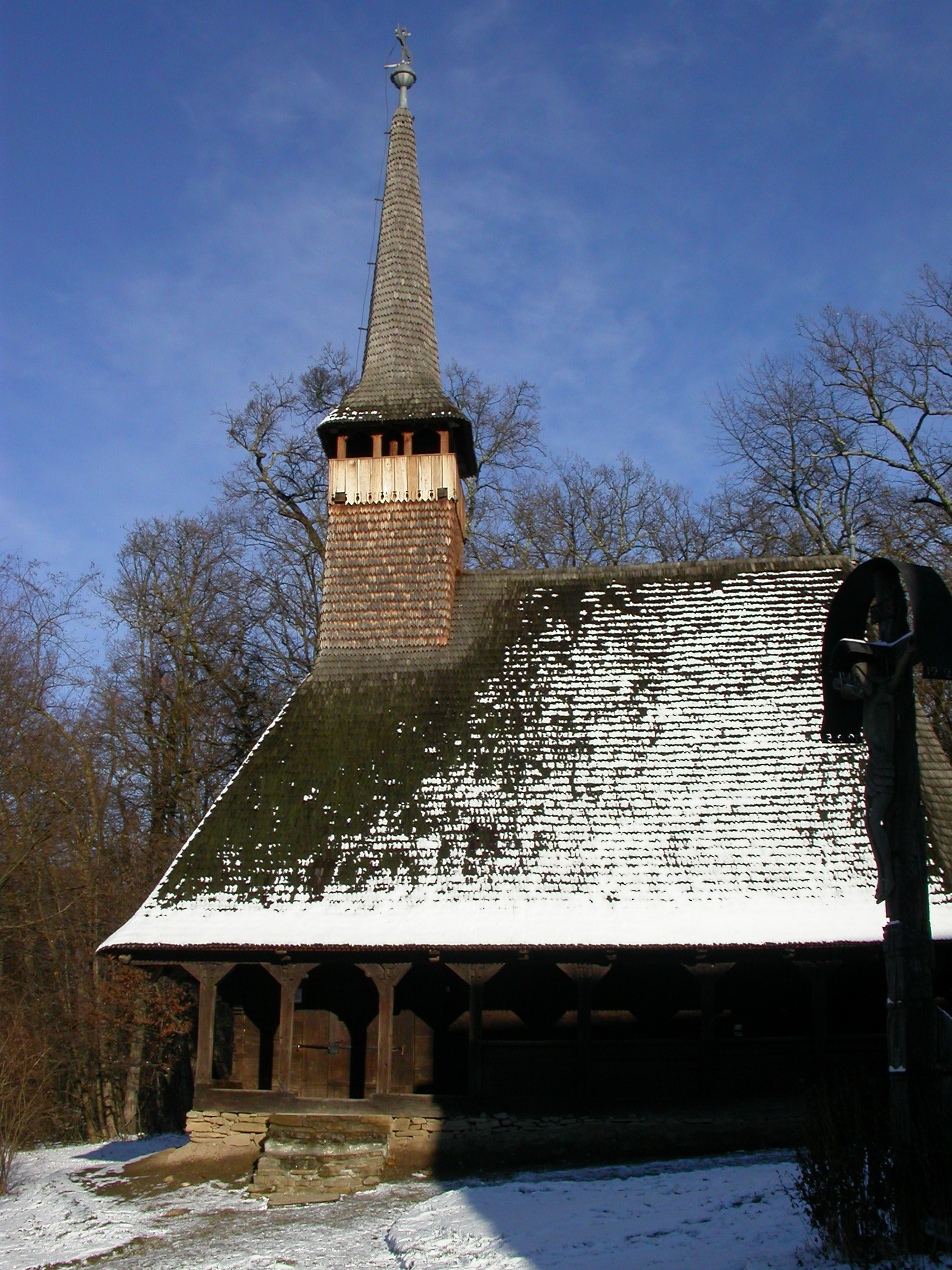 Muzeul Civilizației Populare Tradiționale ASTRA, 1963